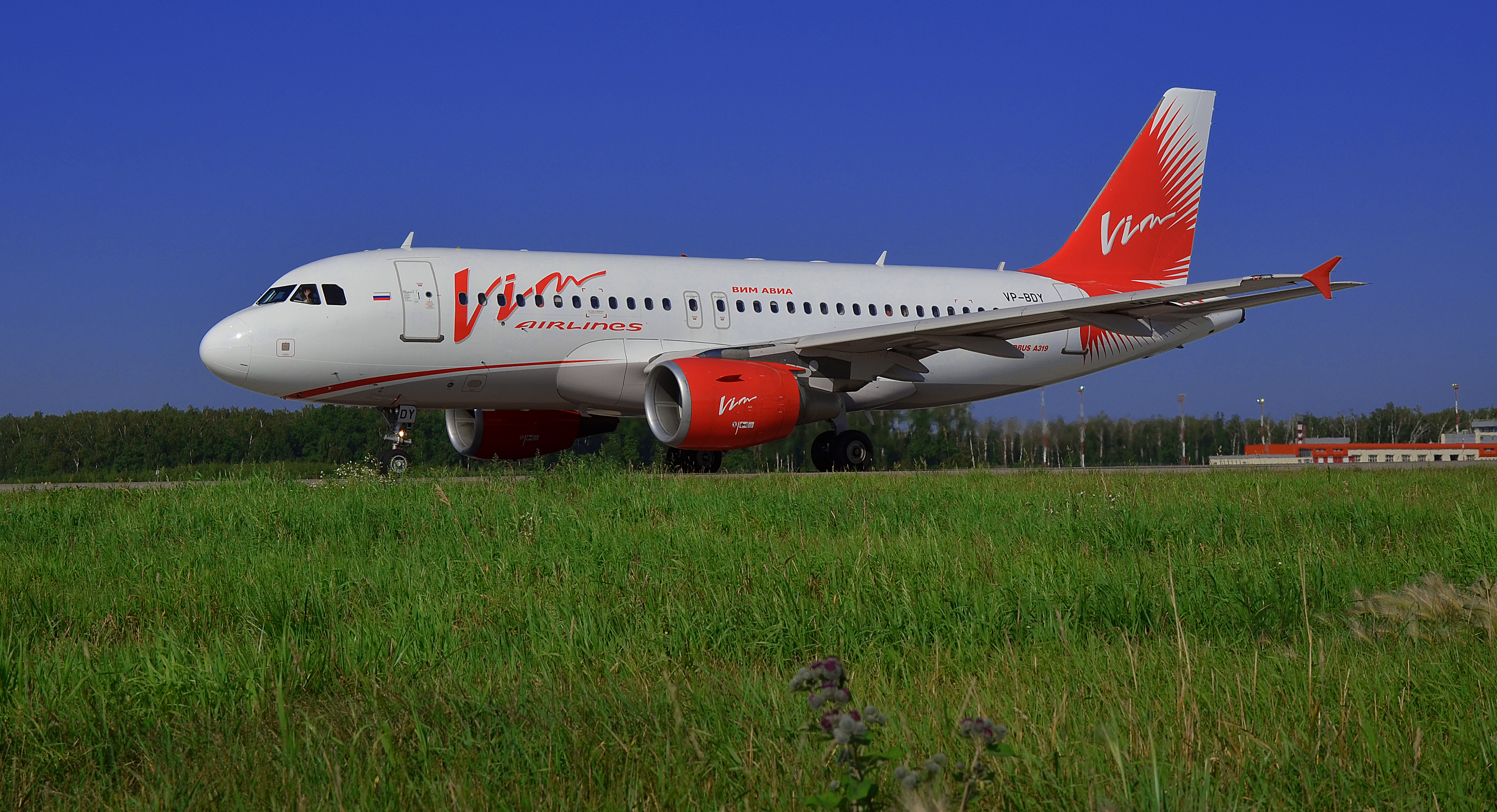 Можно увидеть здесь : You can see here